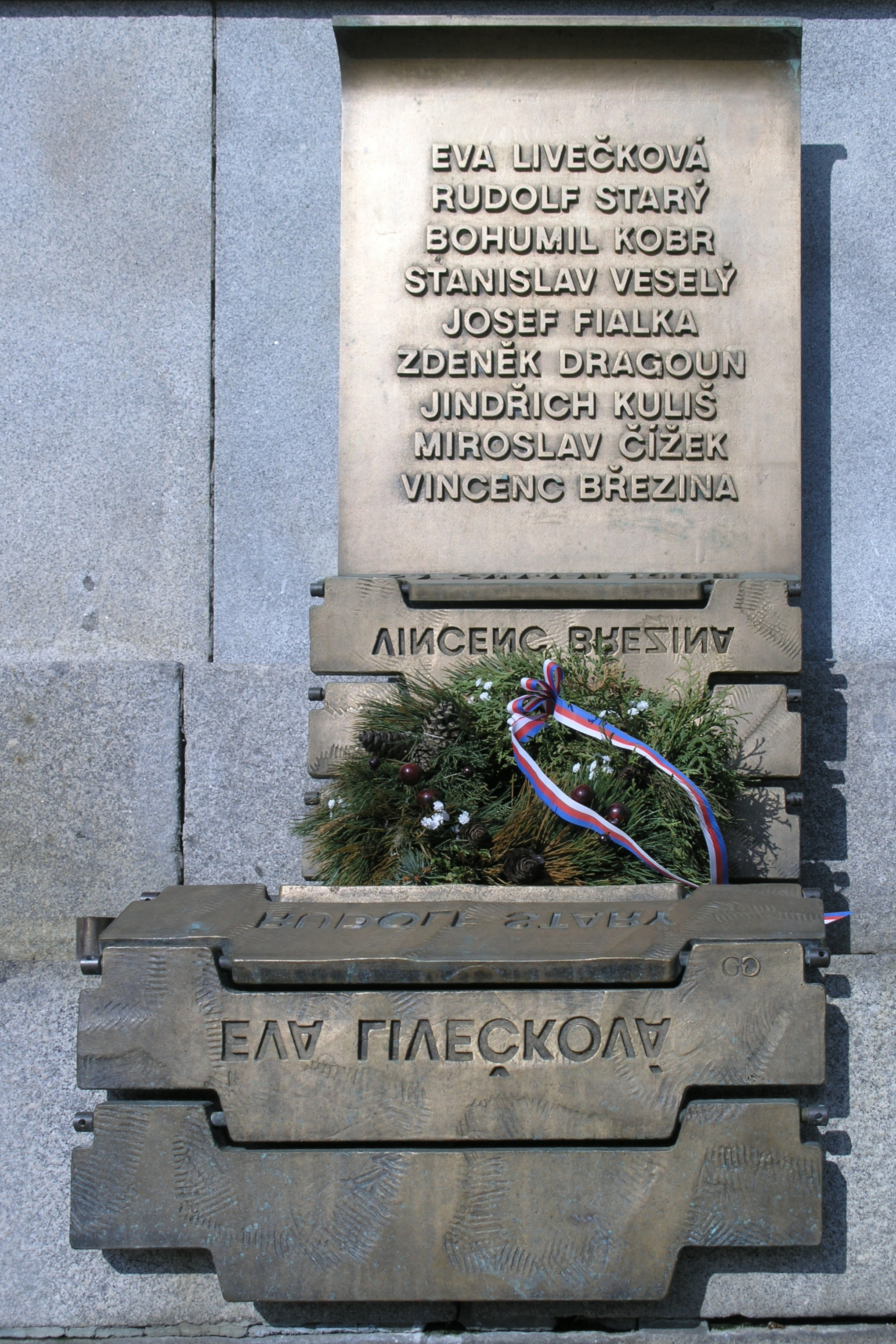 Liberec - památník obětem invaze spojeneckých vojsk v srpmu 1968 na budově radnice